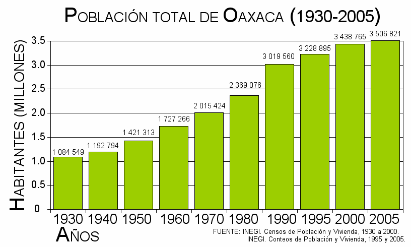 Dinámica poblacional del Estado de Oaxaca de 1930 a 2005 en millones de habitantes